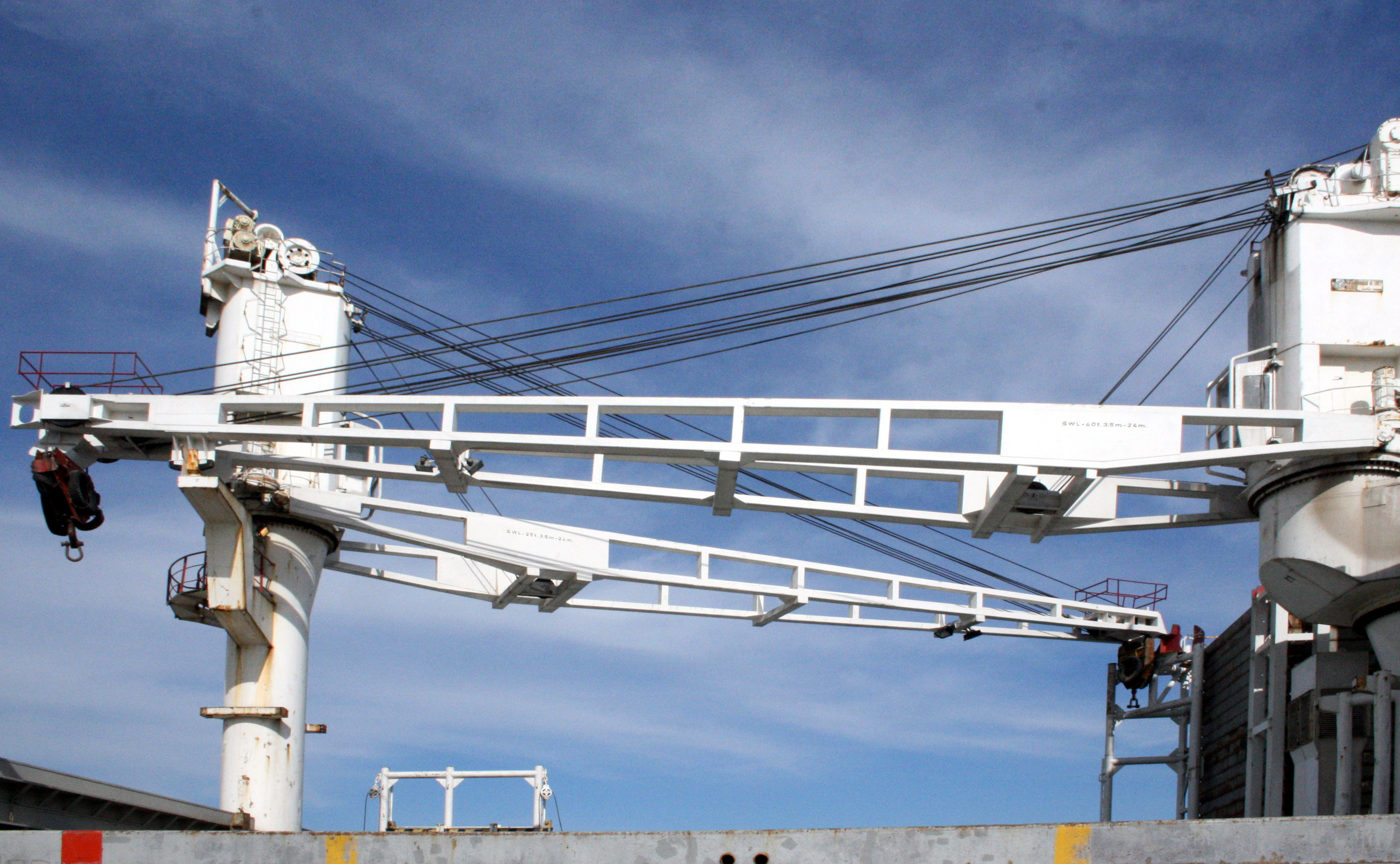 Caroline Delmas dans le port de la Pallice à la Rochelle